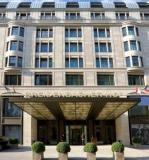 Breitenbacher Hof, Düsseldorf, Aussansicht mit Natursteinfassade